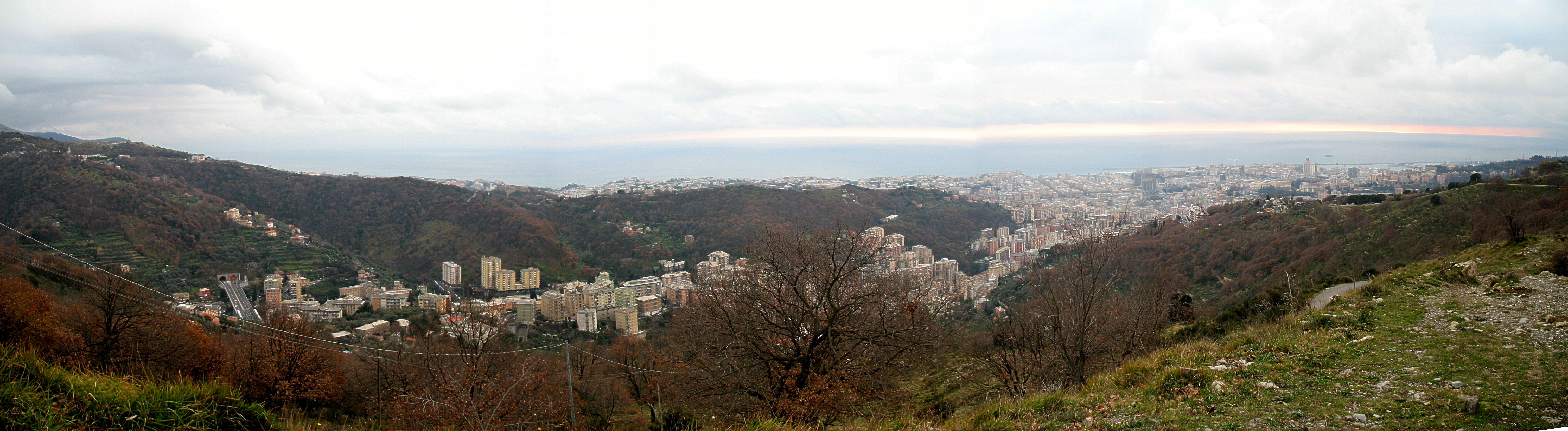 immagine panoramica (quattro foto) di Genova, val Bisagno e valletta del rio Fereggian, ripresa dalle alture di Quezzi.